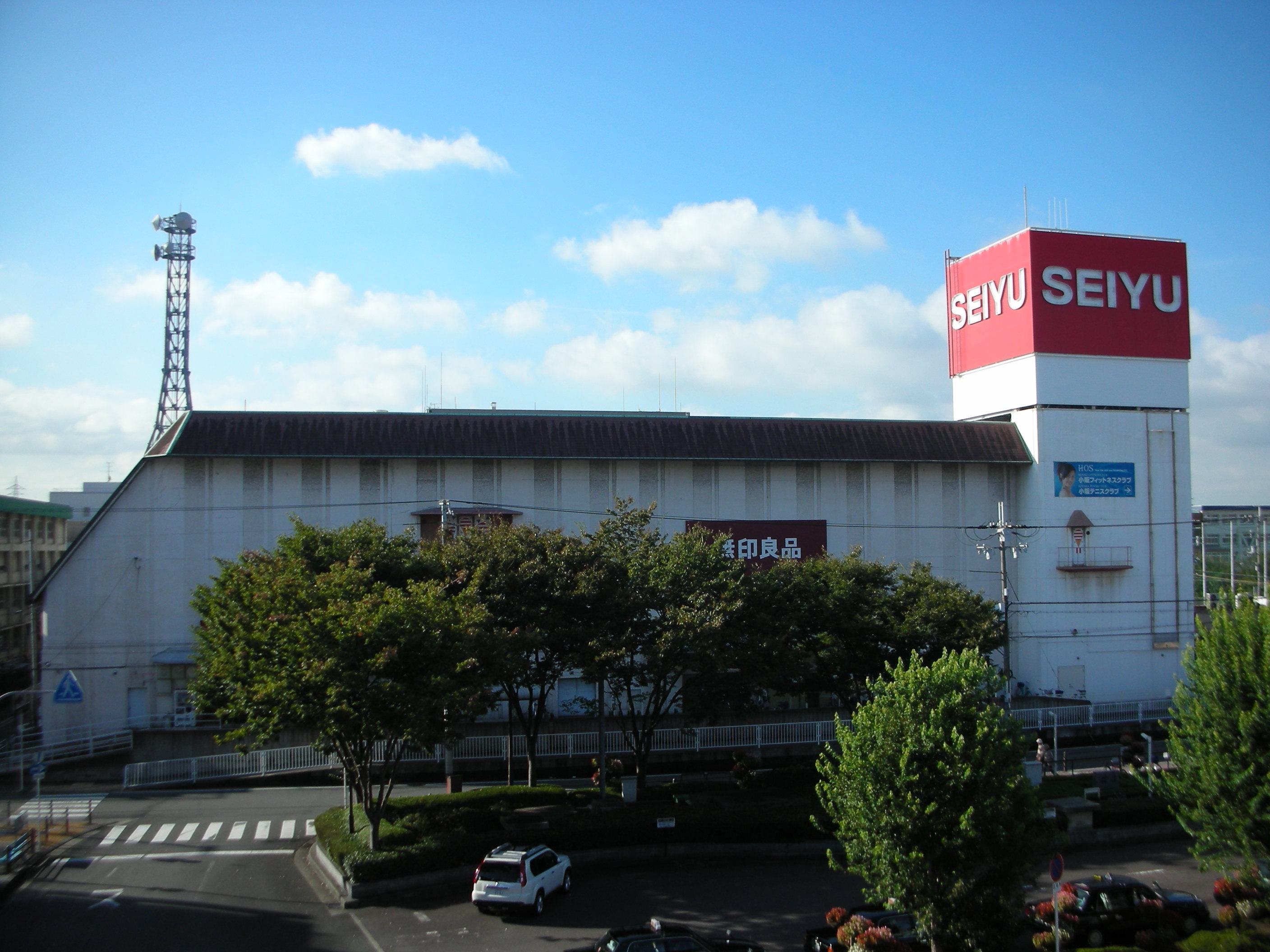 西友八戸ノ里店の外観